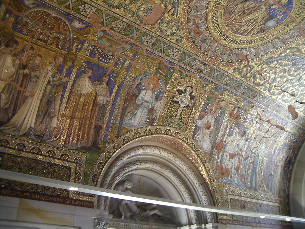 The wall inside the Kaiser-Wilhelm Gedächtnis-Kirche.